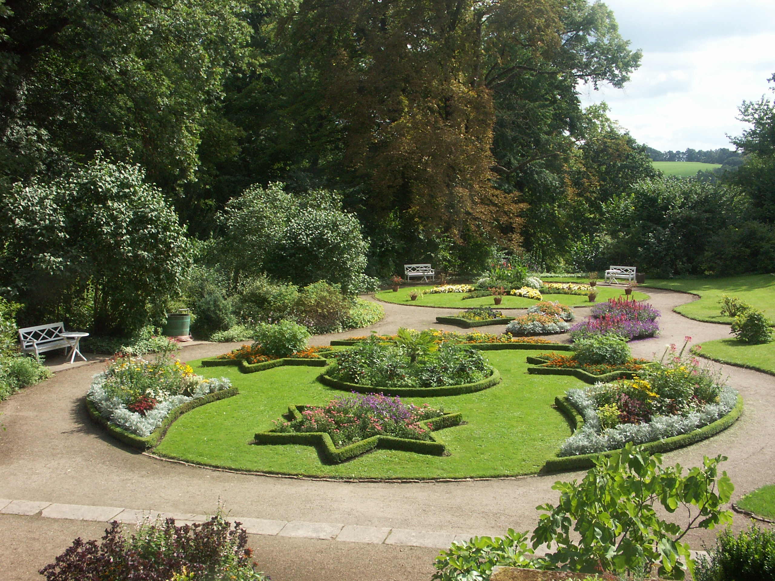 Schloss Kochberg: Blumengarten